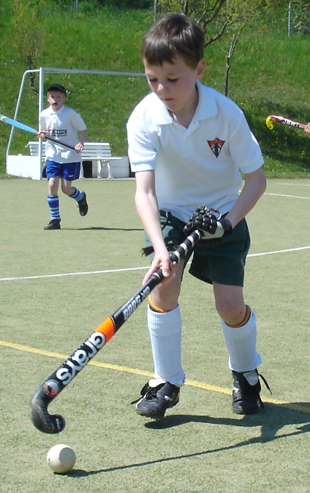 Hockeyspieler, Hockeyclub Konstanz (HCK)